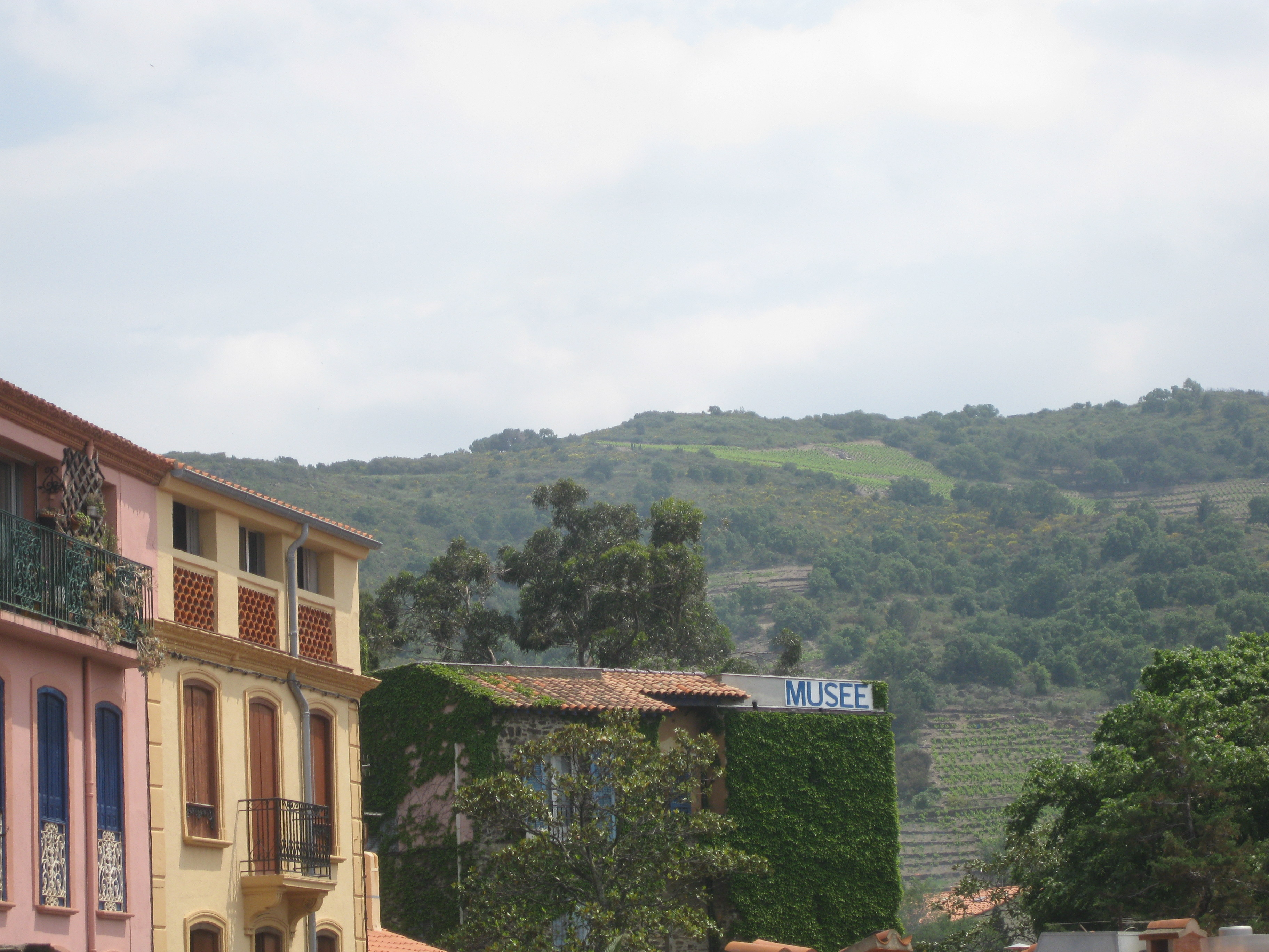 Façana del Museu d'Art Modern de Cotlliure